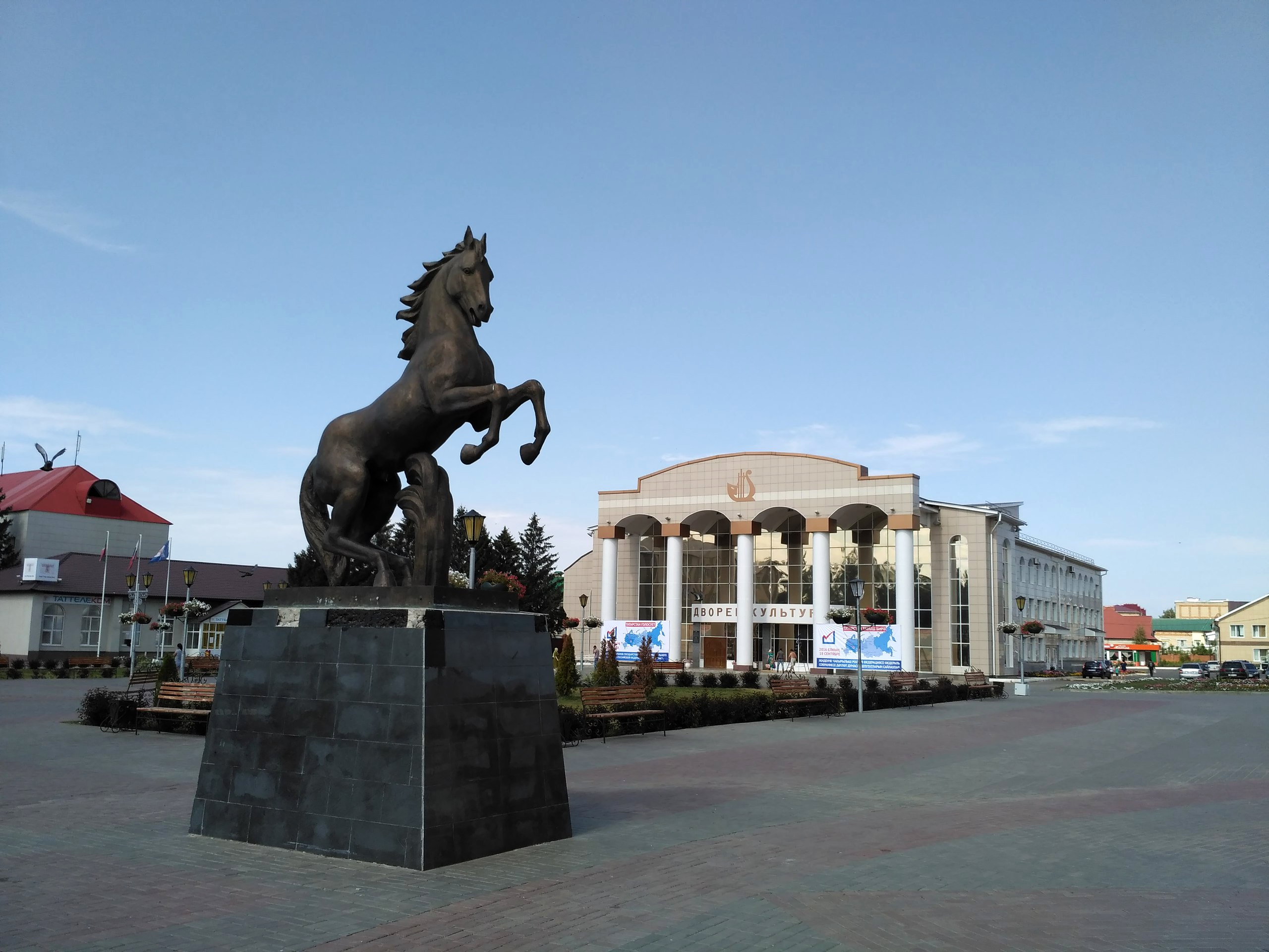 Центральная площадь города Нурлат